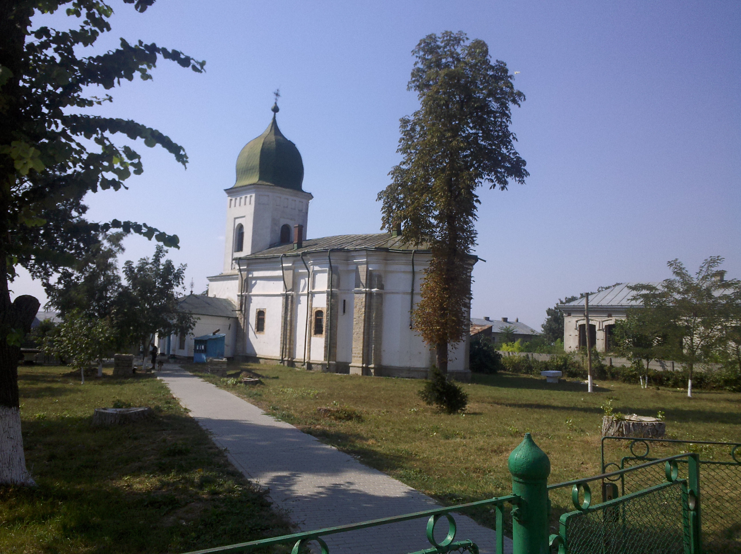 biserica Precista Mică din Roman